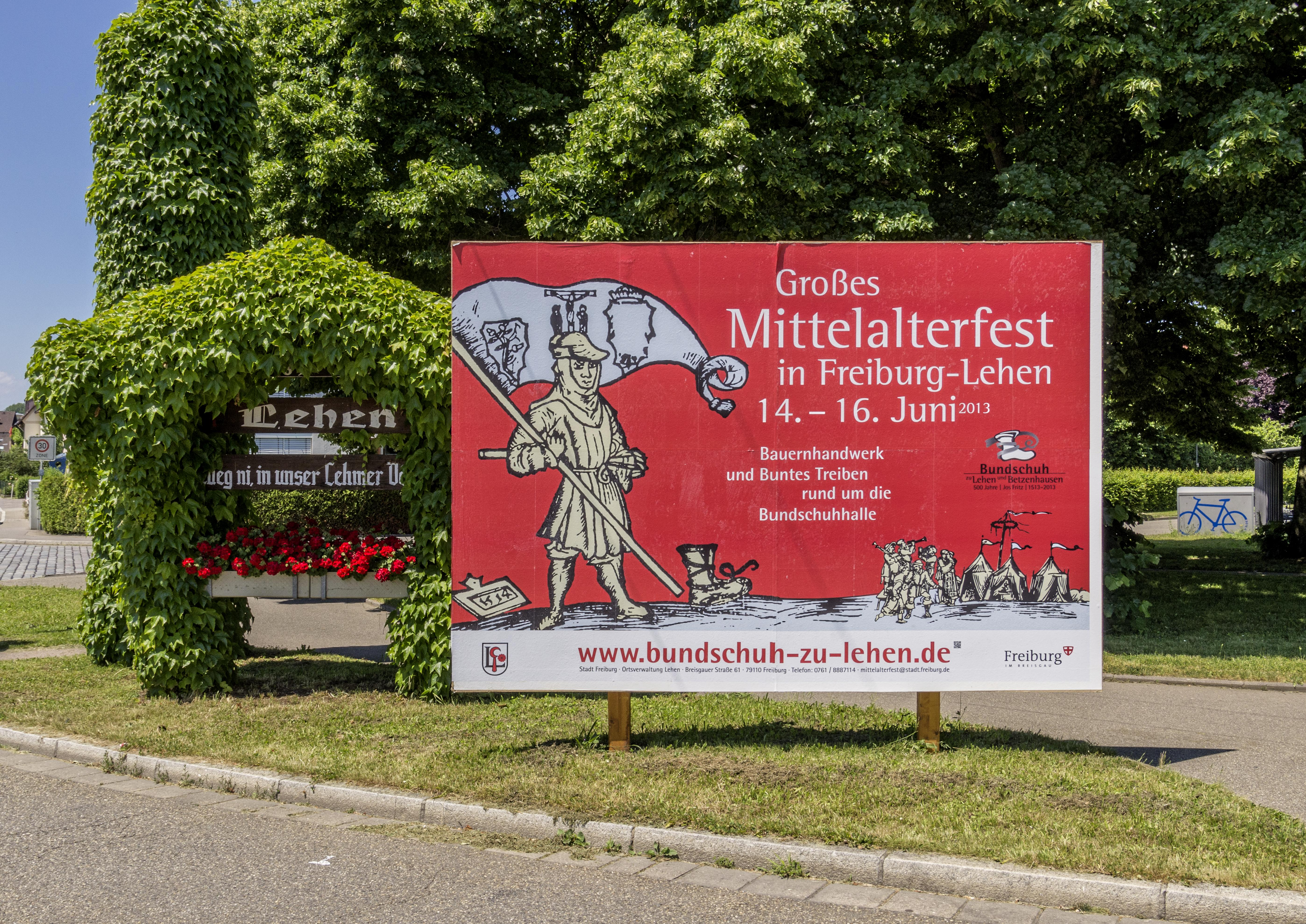 Ortseingang Freiburg Lehen.